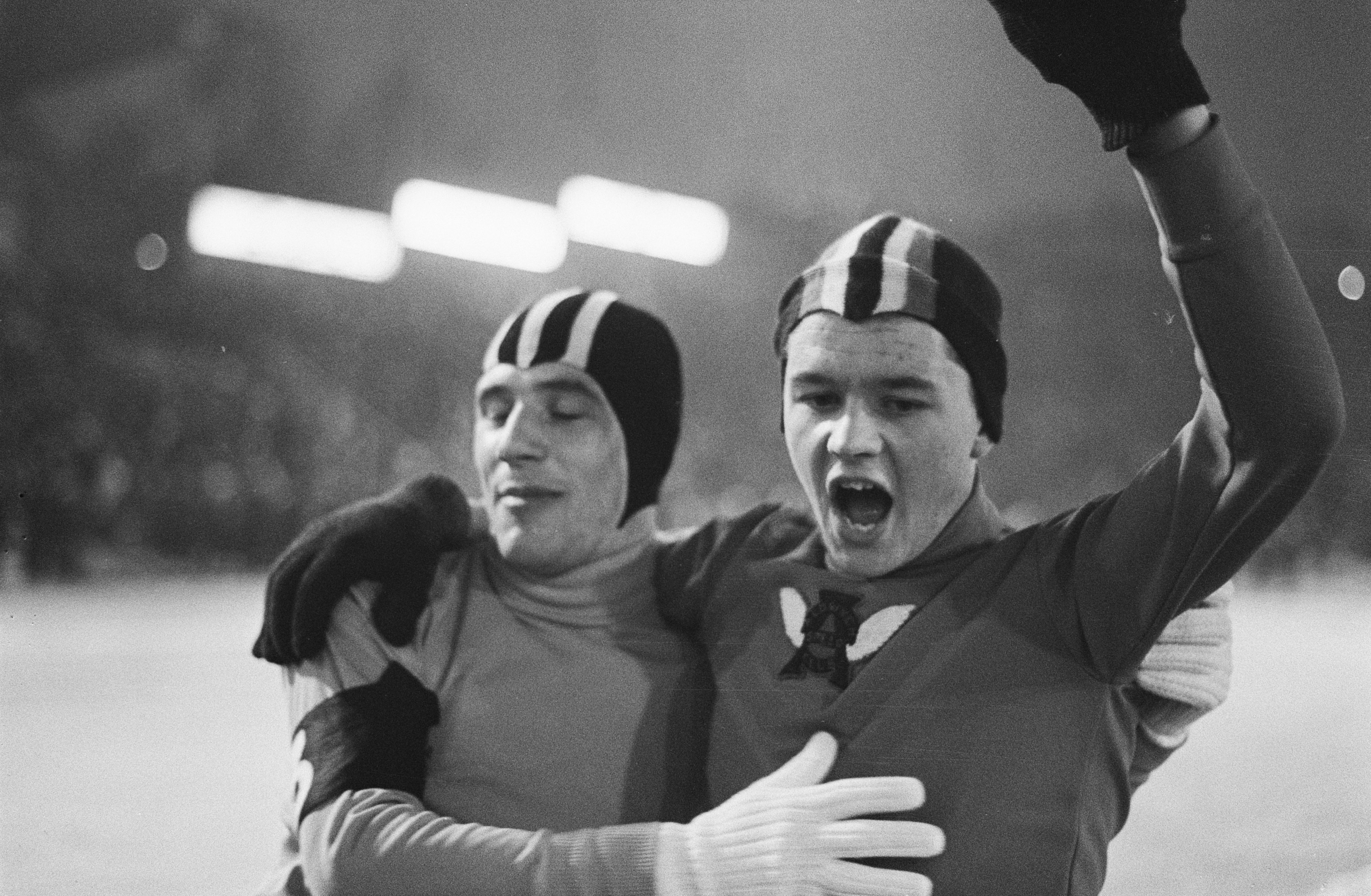 Collectie / Archief : Fotocollectie Anefo Reportage / Serie : [ onbekend ] Beschrijving : Wereldkampioenschappen schaatsen in Oslo, Kees Verkerk samen met John Tipper (Groot-Brittanië) na de 5000 meter Datum : 12 februari 1967 Locatie : Noorwegen, Oslo Trefwoorden : schaatsen, sport Persoonsnaam : Tipper, John, Verkerk, Kees Fotograaf : Kroon, Ron / Anefo Auteursrechthebbende : Nationaal Archief Materiaalsoort : Negatief (zwart/wit) Nummer archiefinventaris : bekijk toegang 2.24.01.05 Bestanddeelnummer : 920-0648